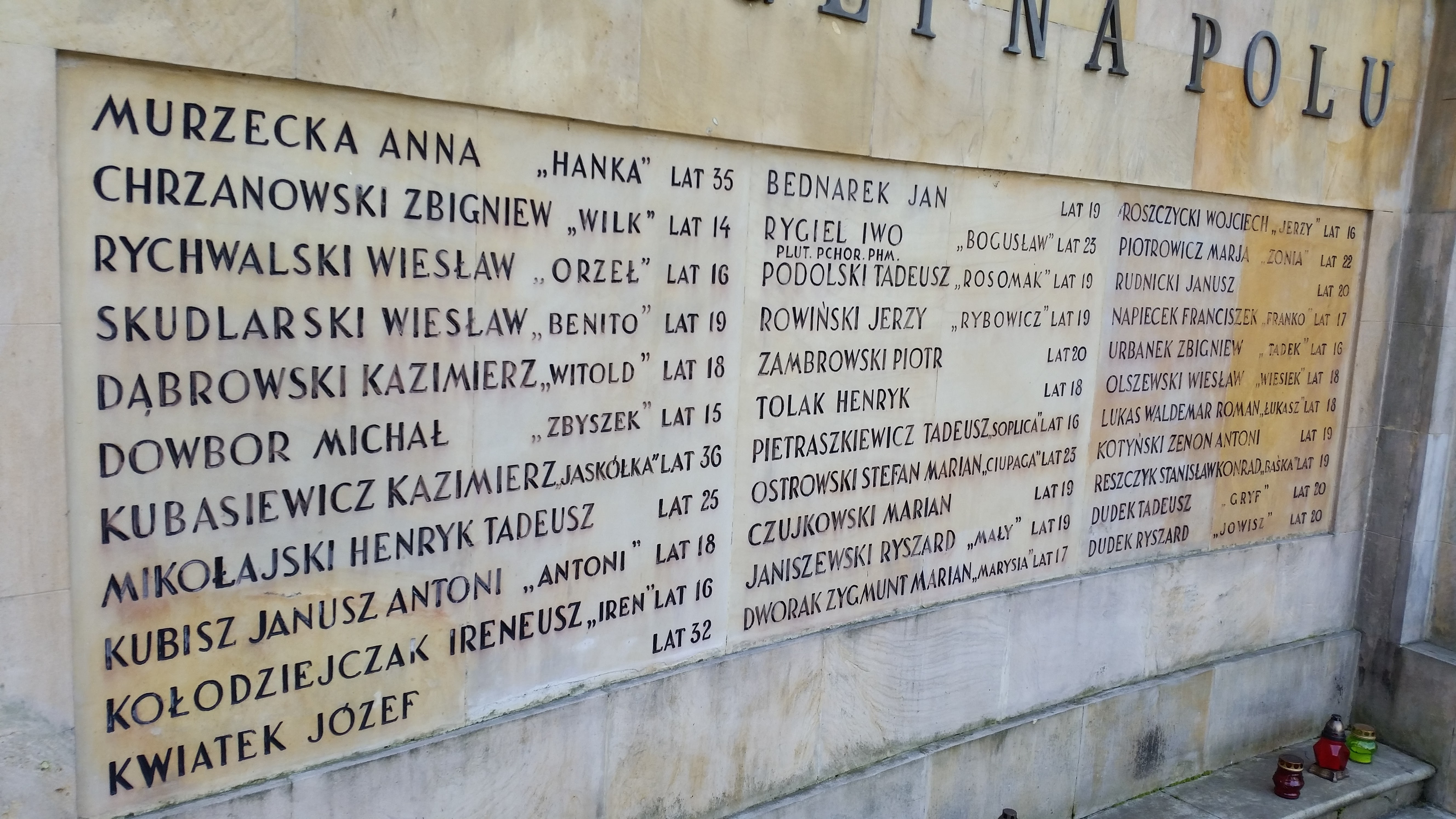 Pomnik Żołnierzy Armii Krajowej z IV Oddziału Ochota, walczących w Powstaniu Warszawskim, poległych 2 sierpnia 1944